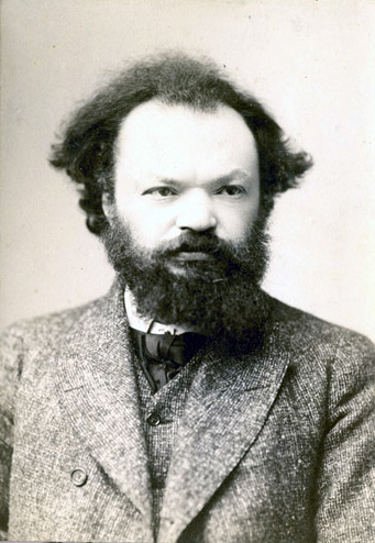 Степняк-Кравчинский, Сергей Михайлович (1851-1895) (BG A53/917, Из архива Аксельрод) М. А. Тургеневой, 87 Union Sqr., NY